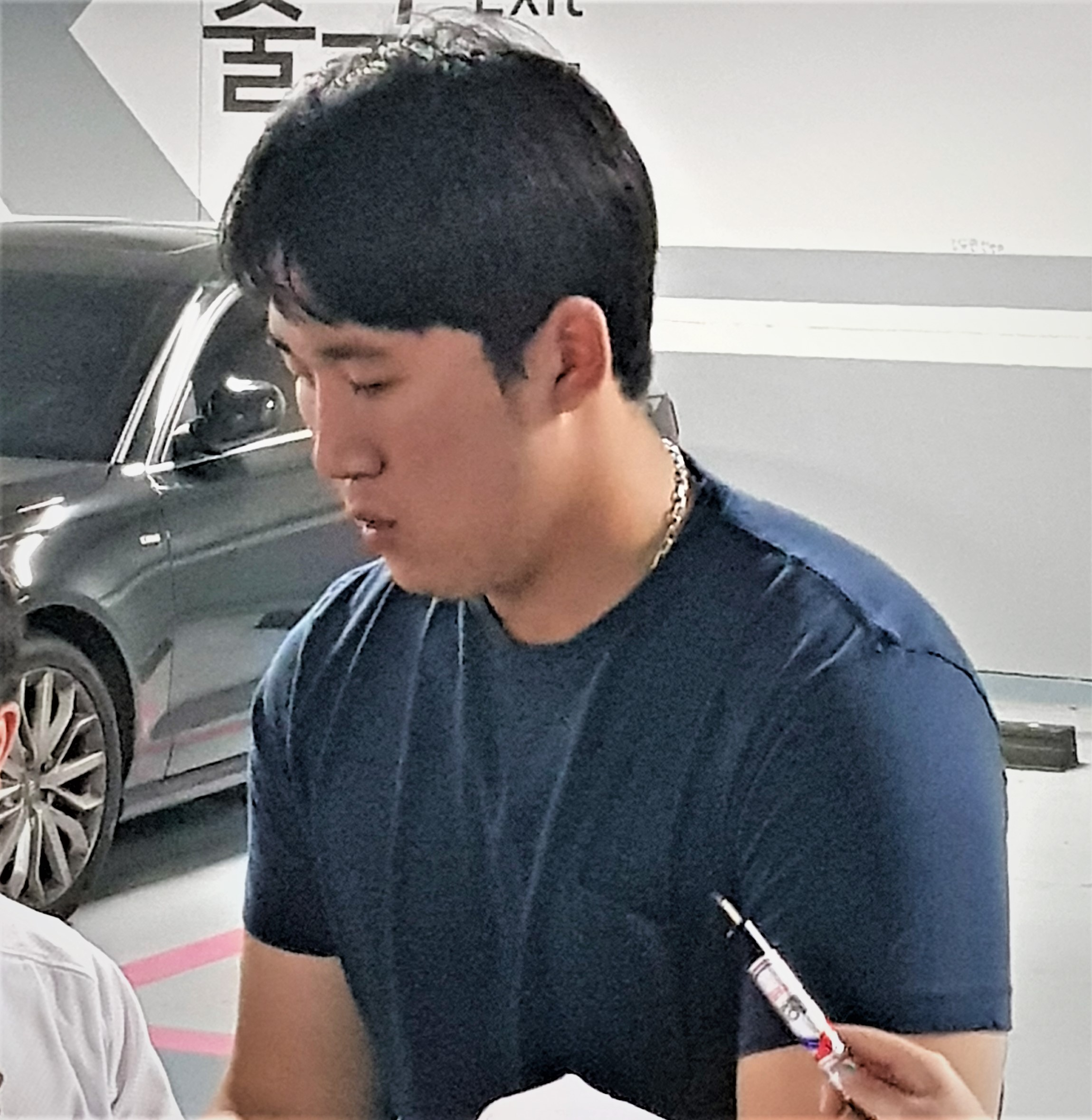 넥센 히어로즈의 장영석 선수